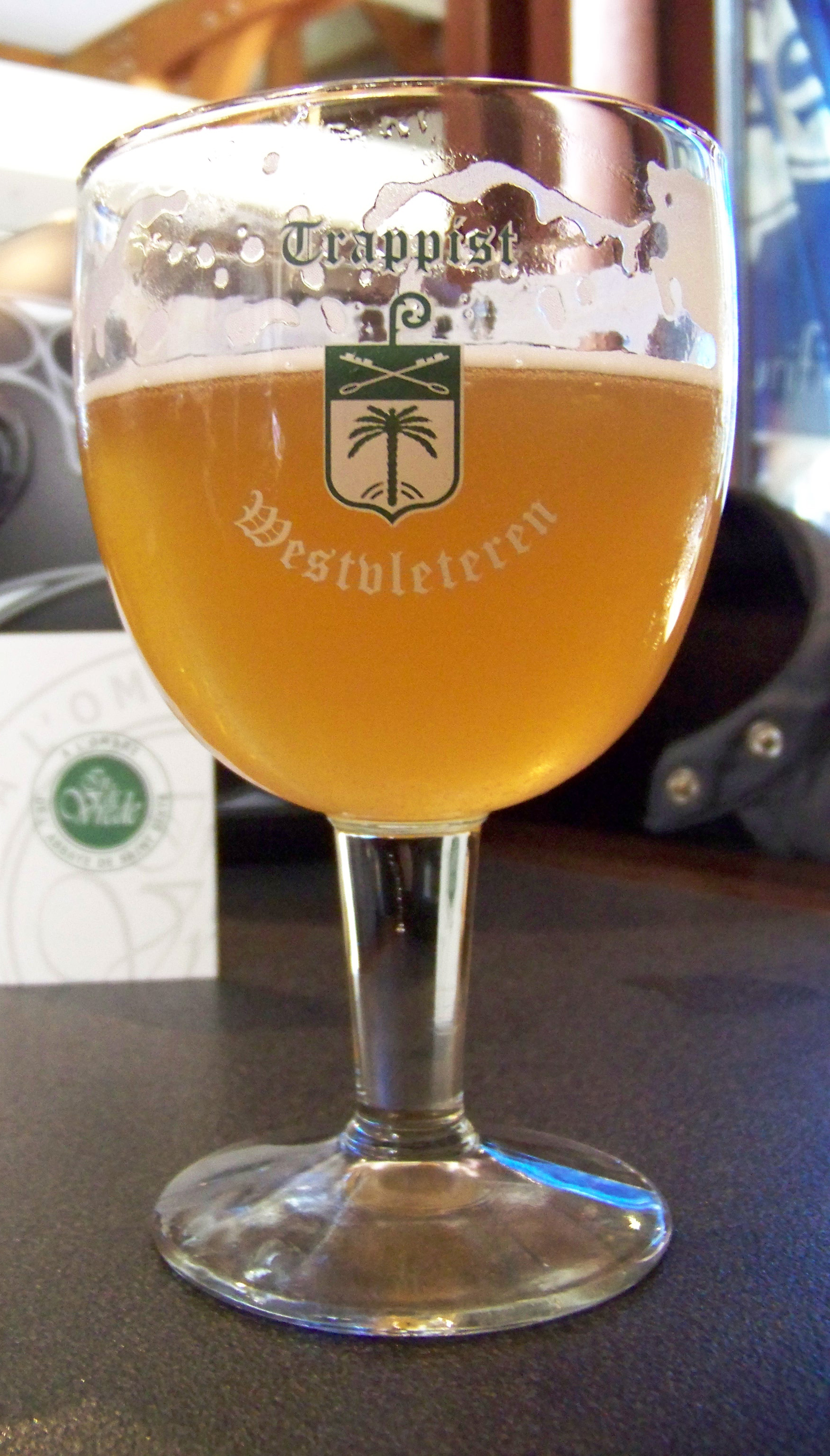 Westvleteren Blonde (5,8 %)